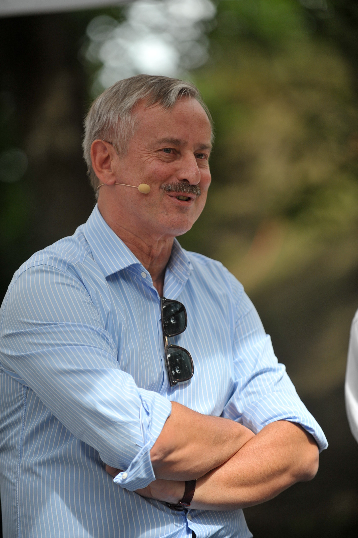 Arvamusfestival 2014: "Endised peaministrid, mida teeksime täna teisiti"